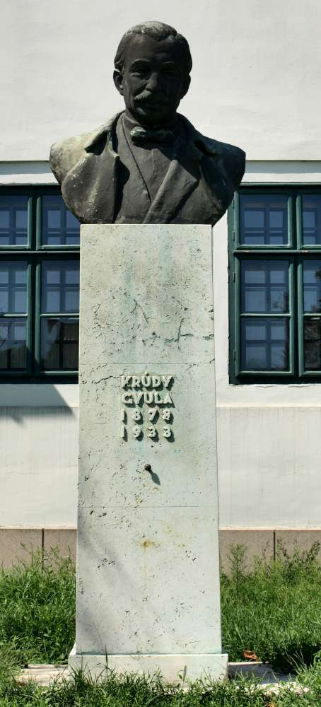 Krúdy Gyula szobor. Gyenes Tamás alkotása (eloxált fém; 1958). - Budapest III., Dugovics tér.